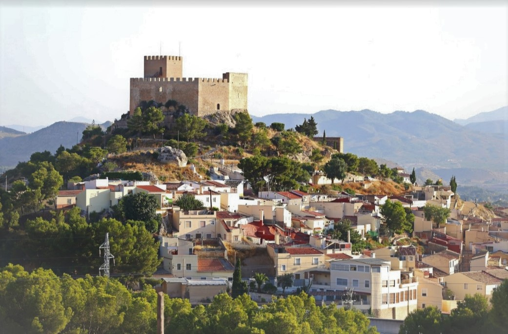 Castillo de Petrel, de origen musulmán en el siglo XII o XIII.